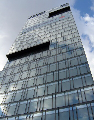 Eurotower; Sliku ustupio Endimion17